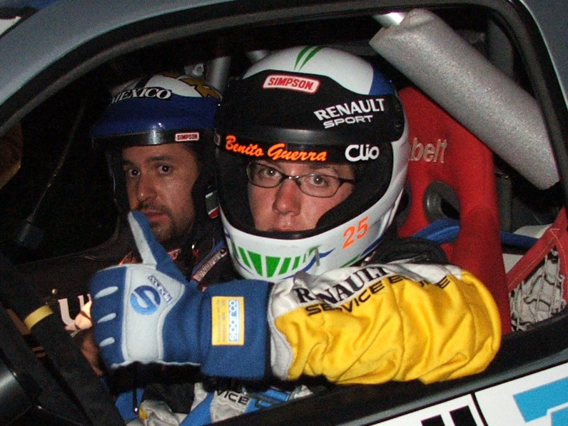 Benito Guerra Jr. y Jaime Lozano en el Rally Patrio 2005 (Morelia, Mich., Mex.)